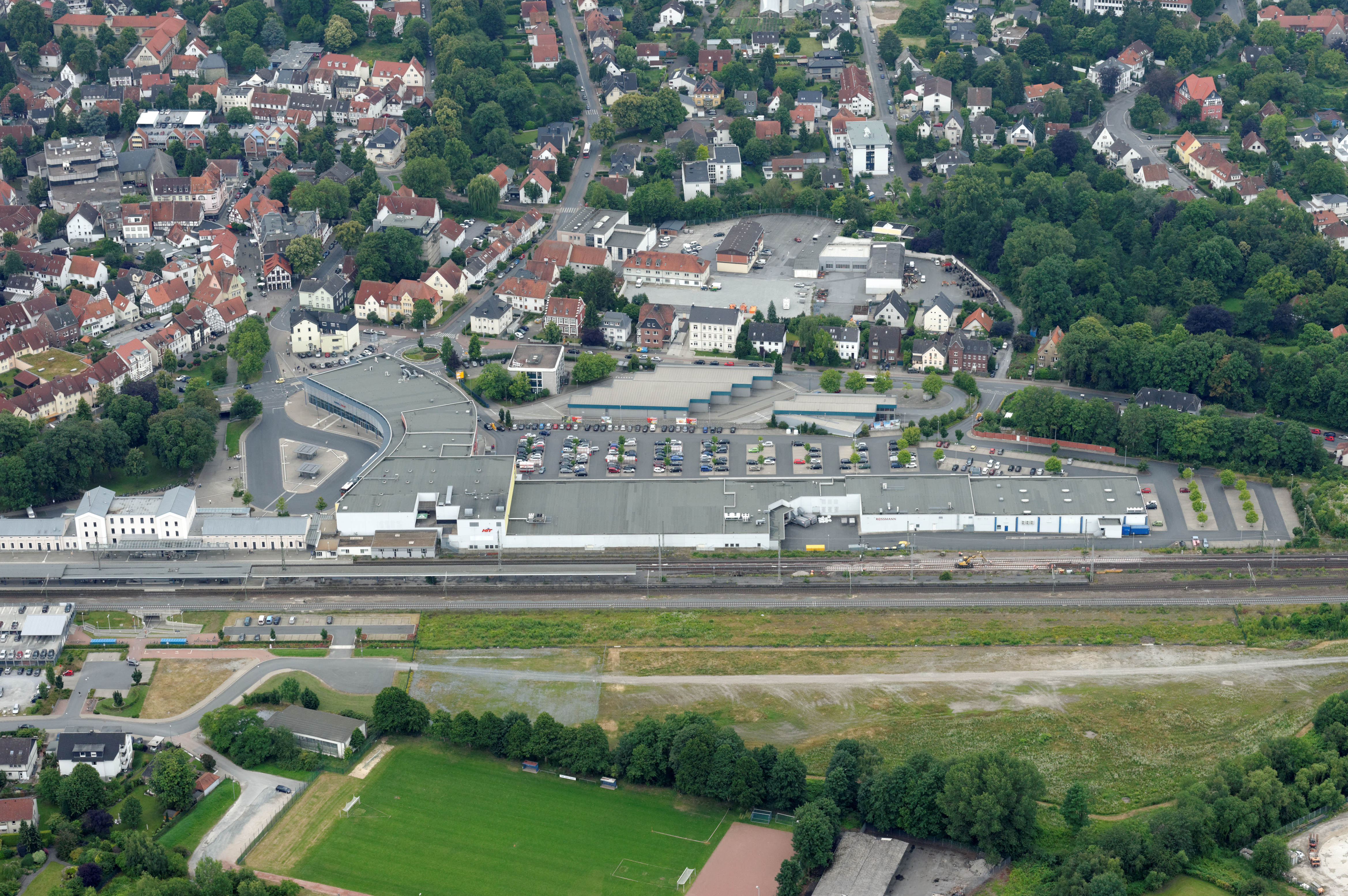 Fotoflug Sauerland Nord. Soest: Bahnhof und Einkaufszentrum „City-Center“. The making of this document was supported by the Community-Budget of Wikimedia Germany.